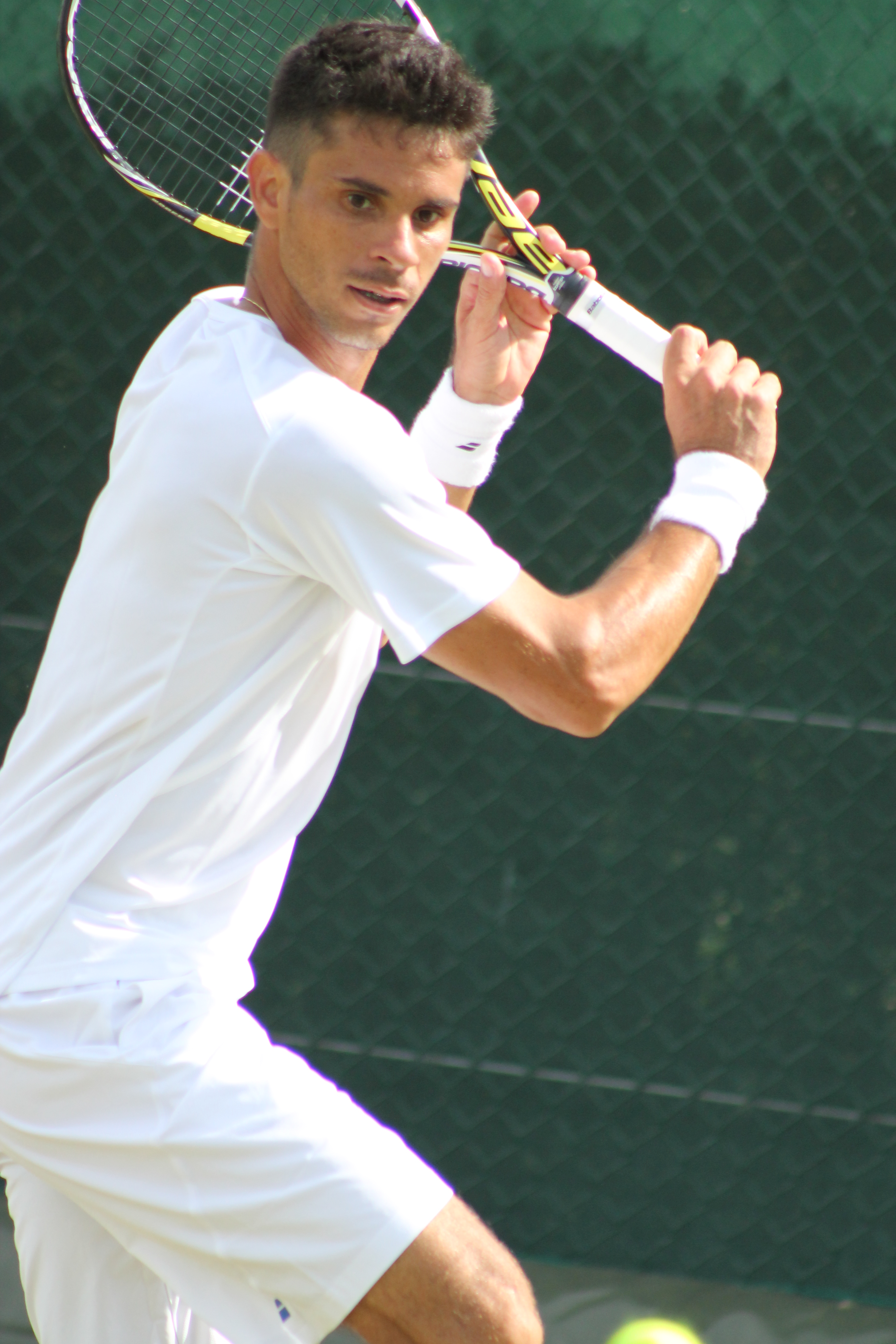 Dutra Silva WMQ14 (23)